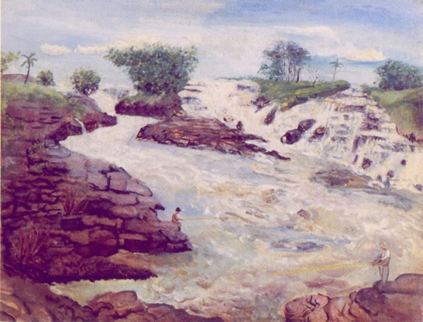 “SALTO DE ITU, BRASIL”, 1935. Erich Brill. Itu River óleo s/ tela 50 x 64 cm Coleção Gabriela Czapski